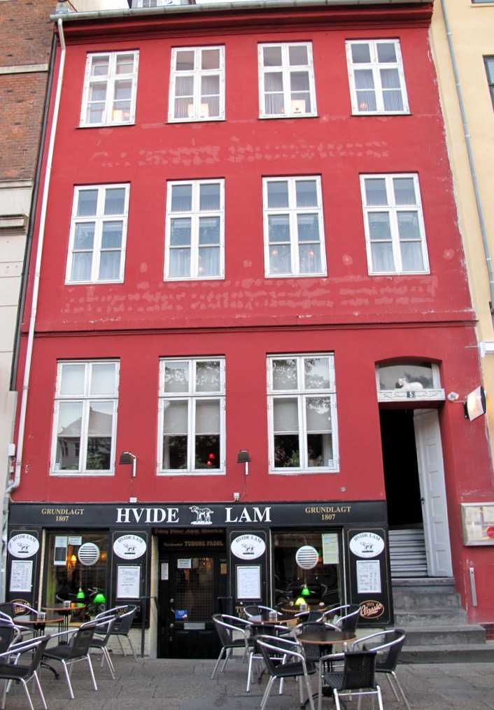 Restaurant MR i 2009.